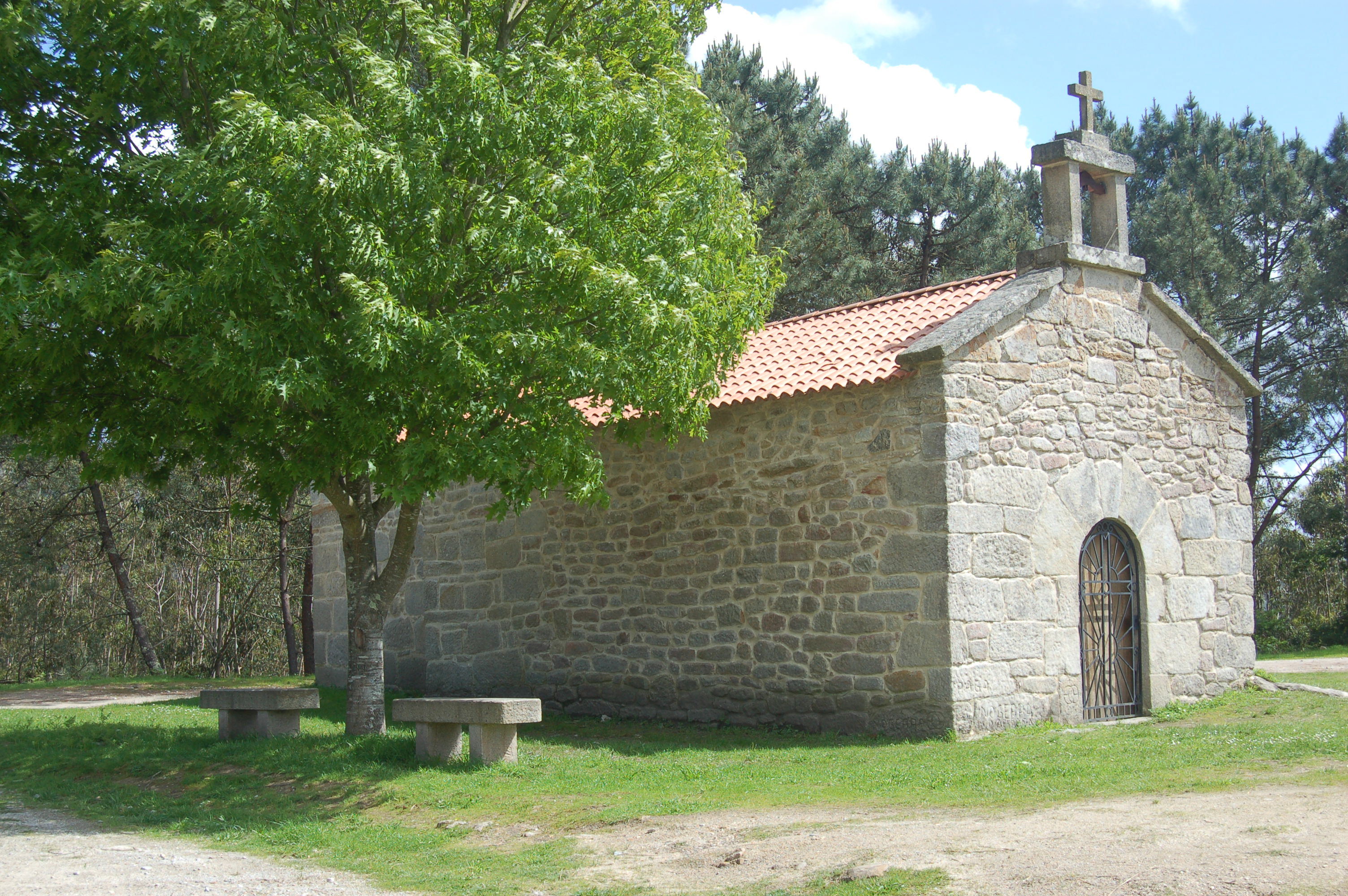 Capela de San Cibrán, na parroquia de Tomeza (Pontevedra)